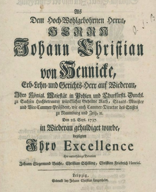 Titelblatt des Originaldrucks der Huldigungskantate für Johann Christian Hennicke auf Wiederau, aufgeführt am 28. September 1737